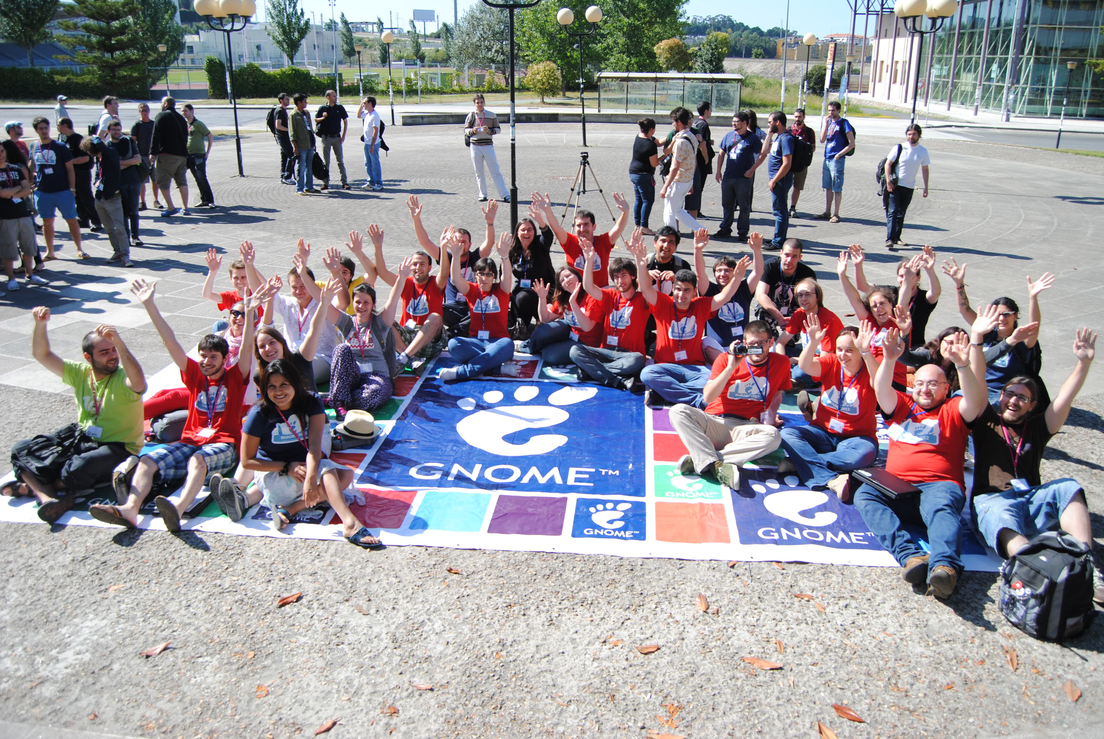 Guadec 2012 A Coruña 26 -31 de Julio More info